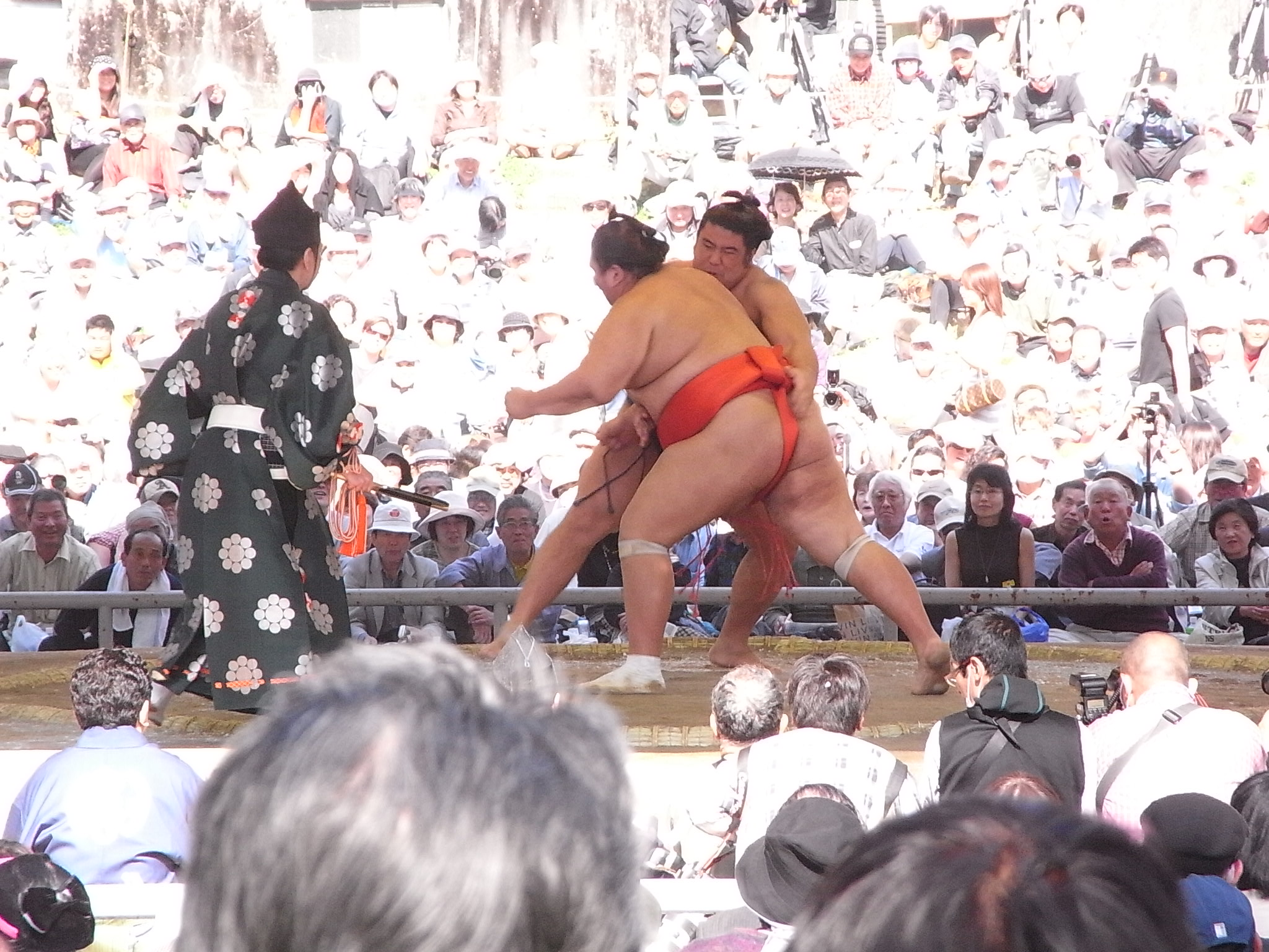 栃煌山雄一郎